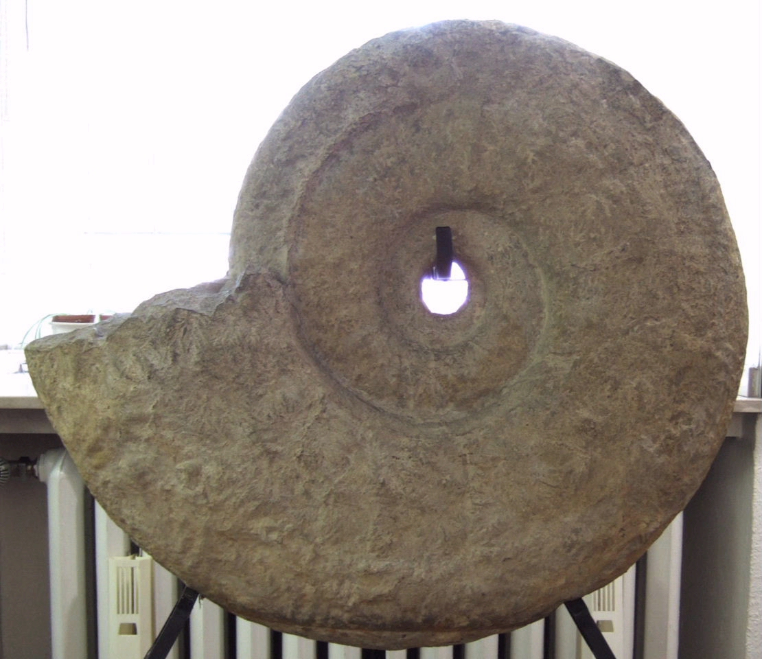 Riesenammonit (Parapuziosa Seppenradensis) aus dem Campanium (Oberkreide, ca. 80 Mio. Jahre alt) Fundort: Kamener Kreuz Ausstellungsstück im Museum der Stadt Gladbeck (Schloss Wittringen) Aufnahme: 17.4.2006 Url